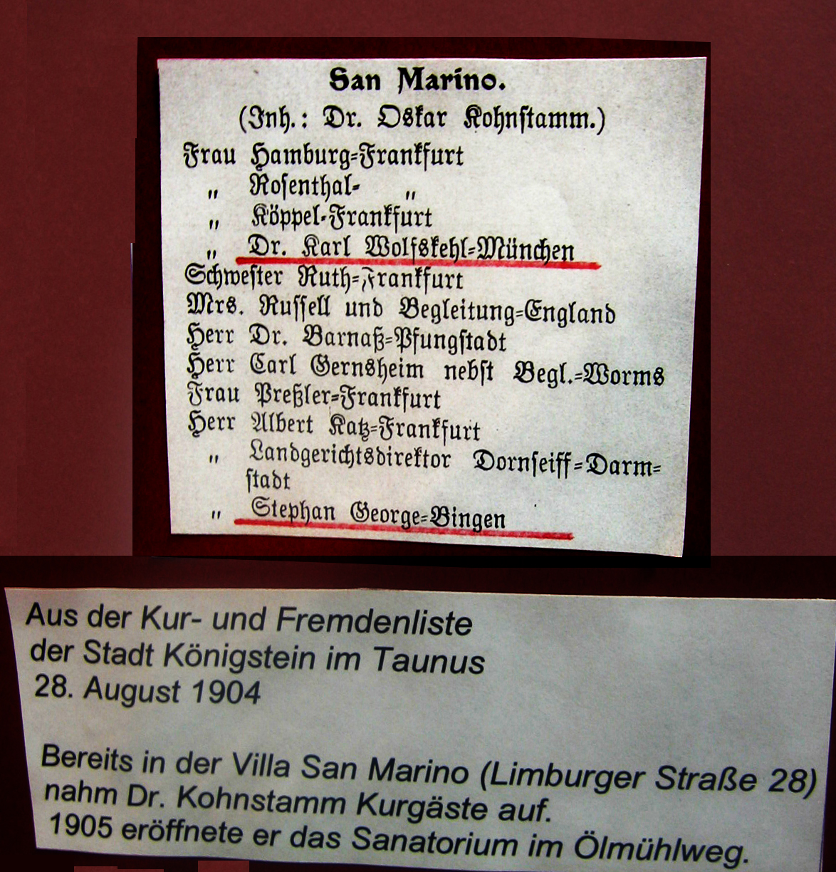 Stefan George und Karl Wolfskehl als Gäste im Jahre 1904 im Hause "San Marino" in Königstein im Taunus. Auszug aus der Kur- und Fremdenliste - Ausstellung des Stadtarchiv Königstein in der Städtbücherei im Jahre 2012: "Aus der Kur- und Fremdenliste der Stadt Königstein im Taunus, 28. August 1904. Bereits in der Villa San Marino (Limburger Straße 28) nahm Dr. Kohnstamm Kurgäste auf. 1905 eröffnete er das Sanatorium im Ölmühlweg."